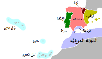 الپُرتُغال ومُحيطها سنة 1415م.